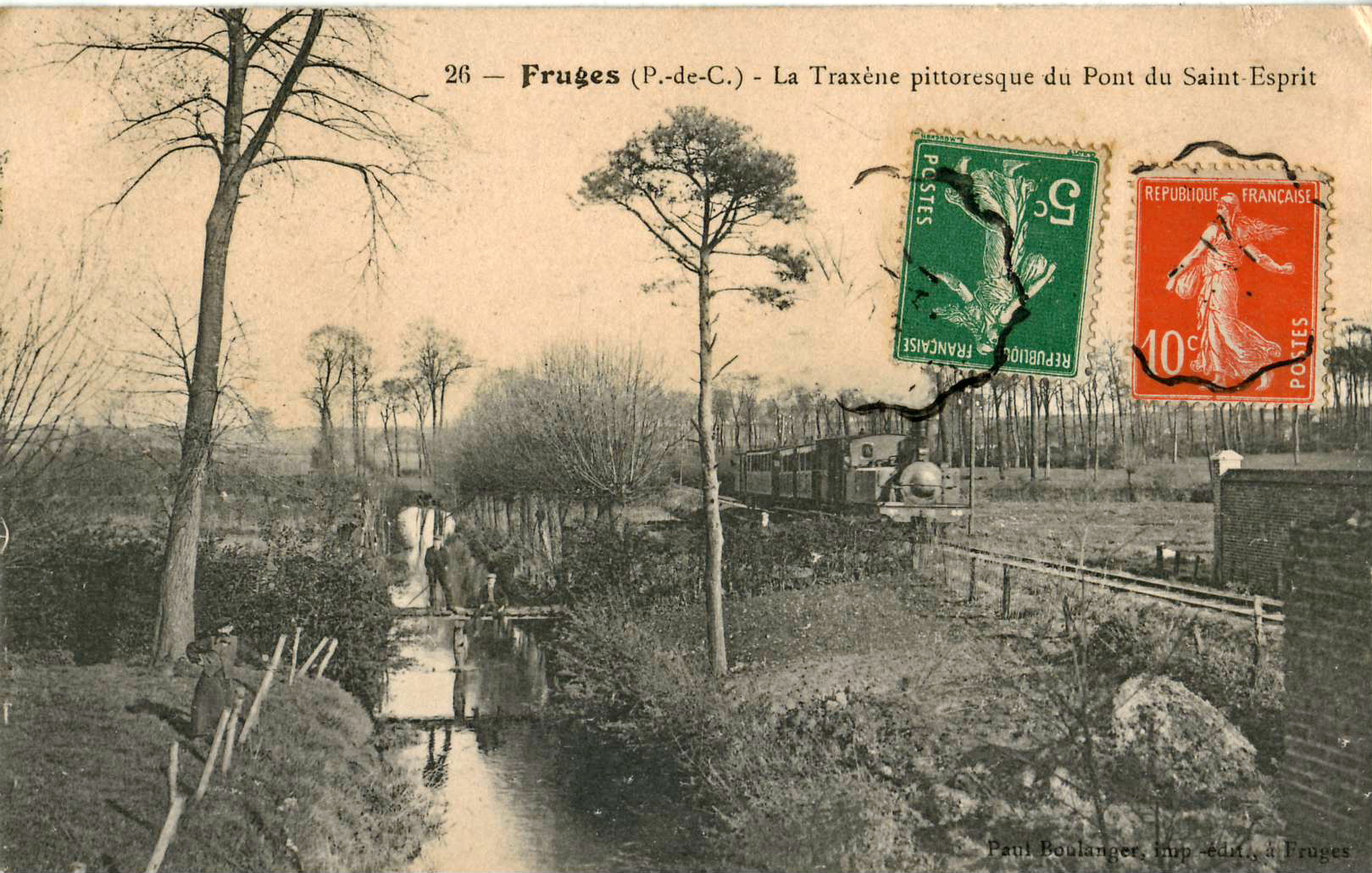 Carte postale ancienne éditée par Paul Boulanger, imprimeur-éditeur à Fruges : FRUGES - La Traxène pittoresque du Pont du Saint-Esprit